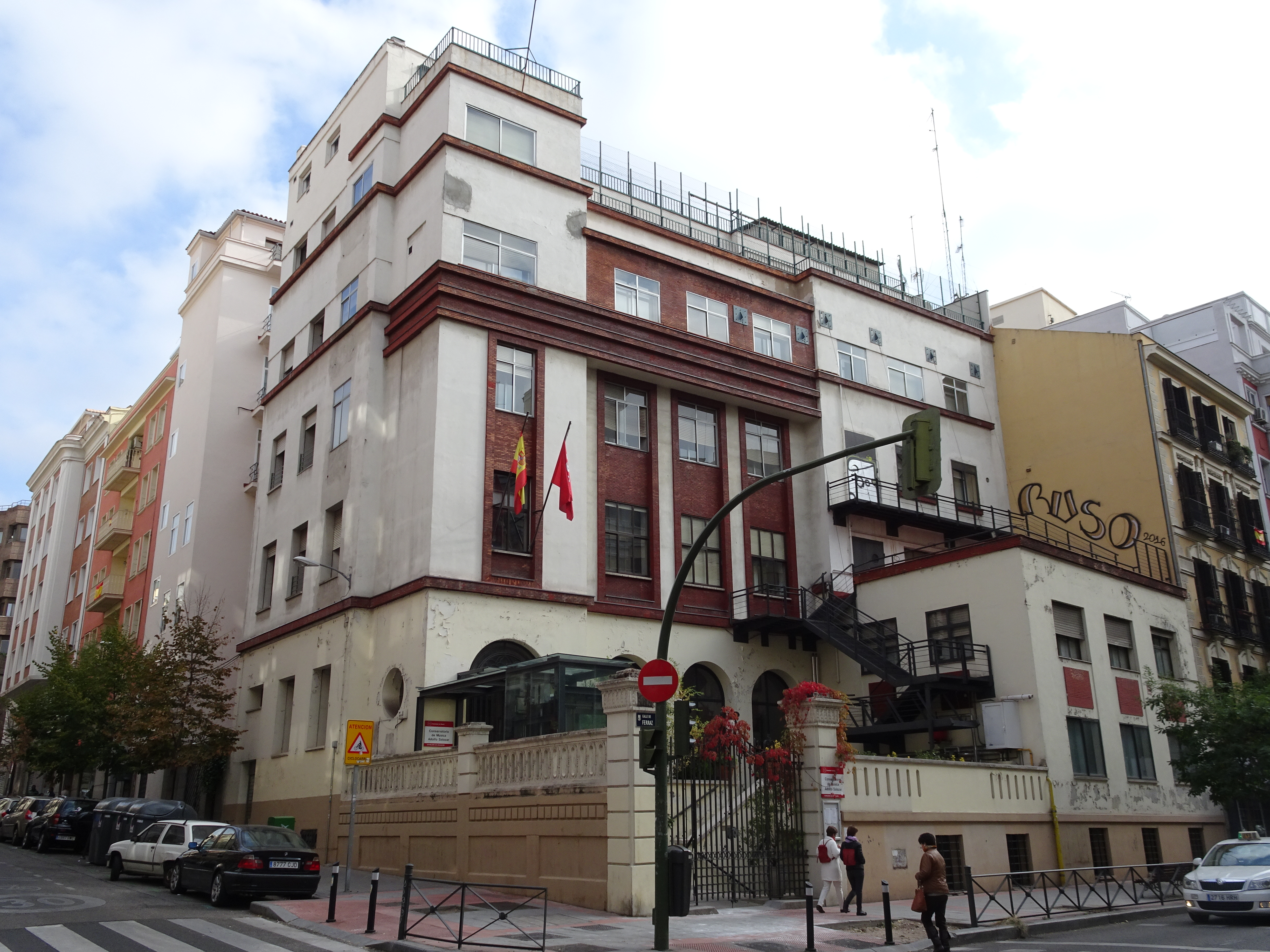 Actuales Conservatorio Profesional de Música de la Comunidad de Madrid y Federación de Servicios Públicos UGT Madrid